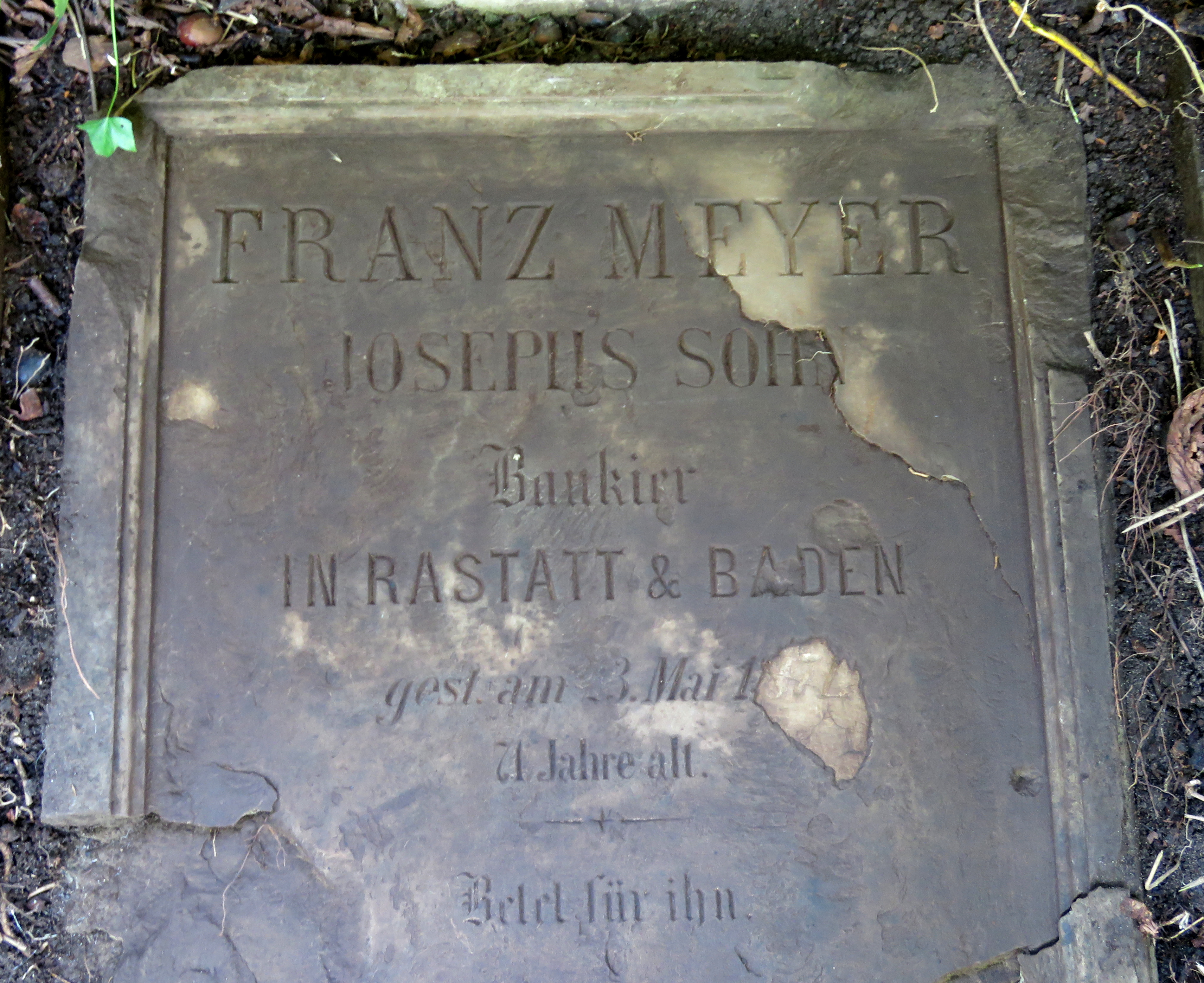 Garbstein des Bankiers Franz (Simon) Meyer (1799-1871)